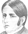 Retrato de Lorenzo A. Fernández, Rector de la Universidad de la República de Uruguay entre 1849 y 1850.